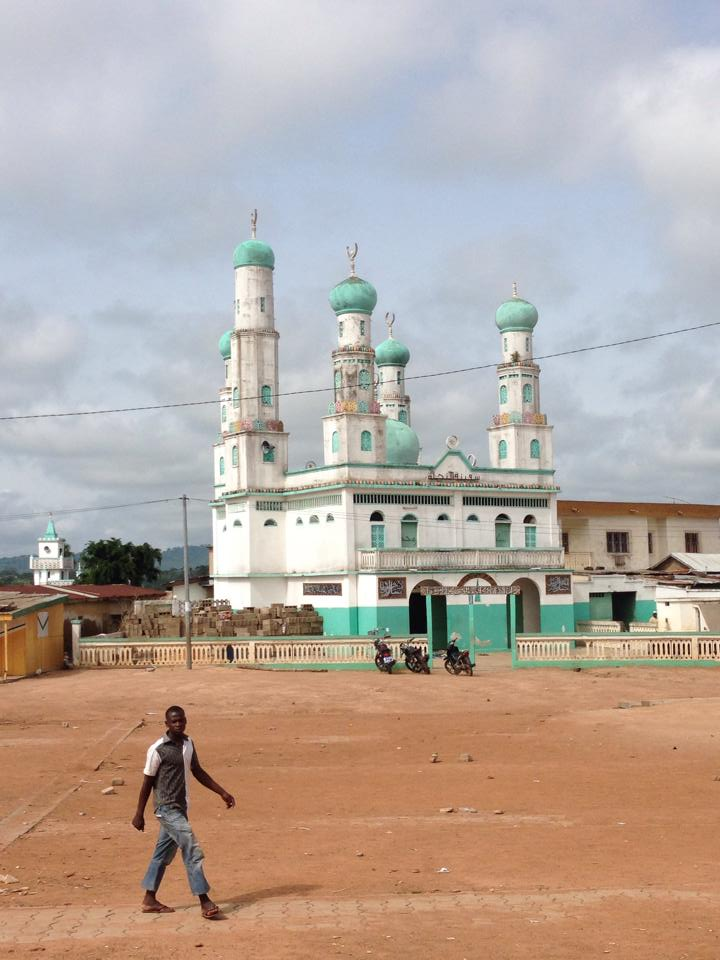 המסגד המרכזי בבונדוקו חוף השנהב